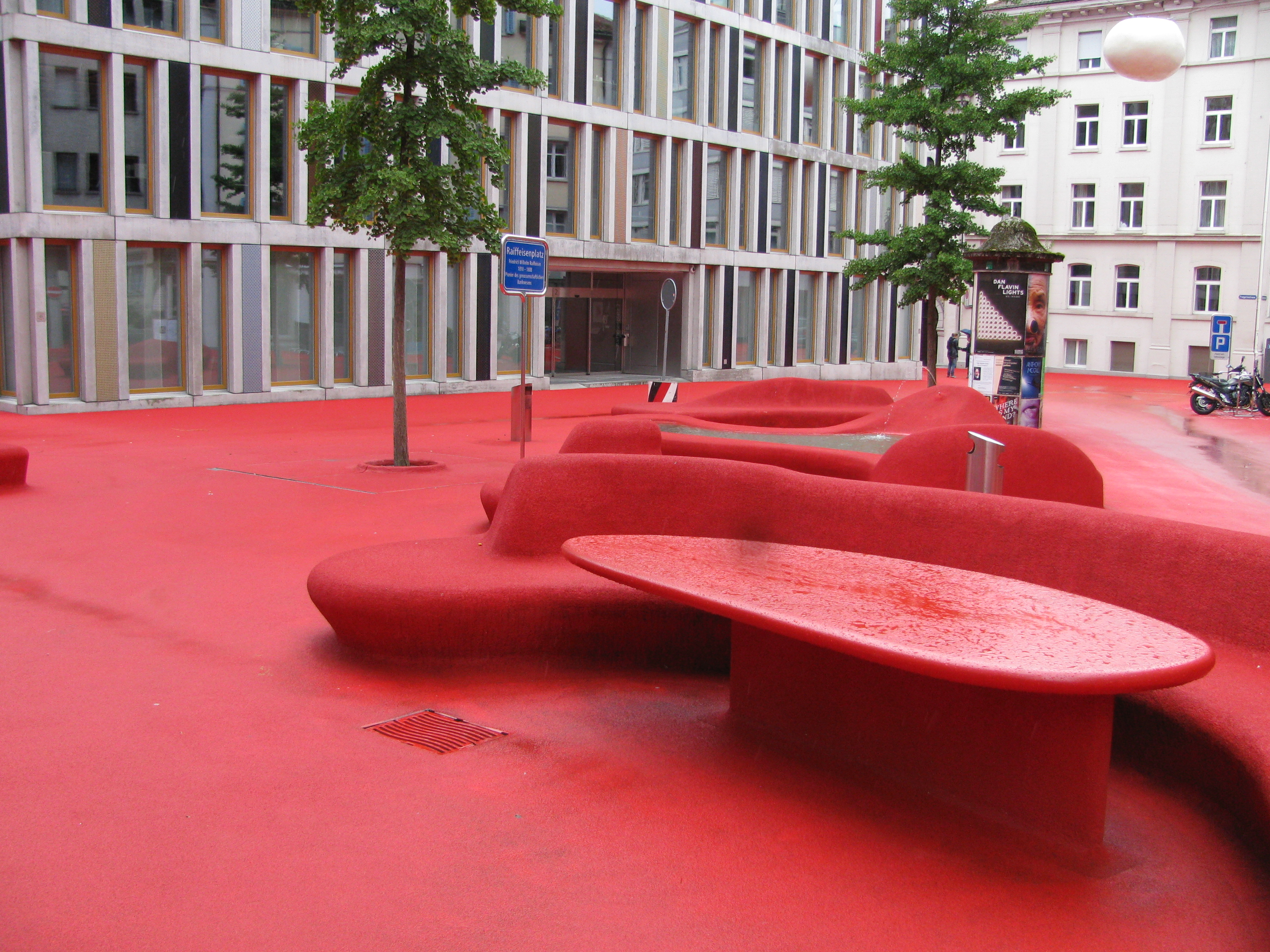 Schweiz - Kanton St. Gallen - St. Gallen: Stadtlounge